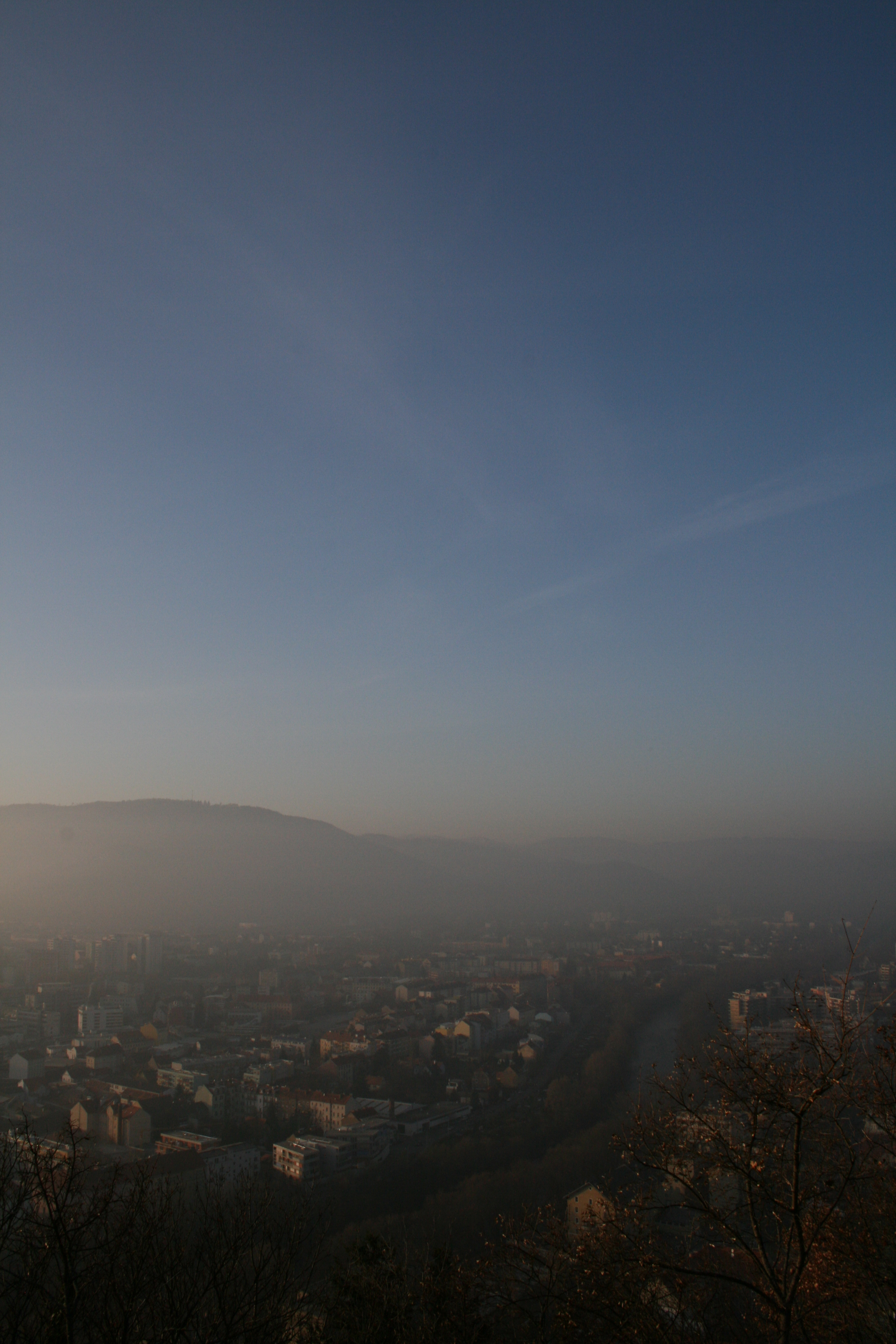 Graz, Austria: Blick vom Schlossberg im Dezember 2006: unten in der Stadt liegt dichter Nebel, weiter oben herrscht strahlend blauer Himmel